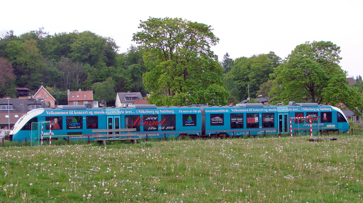 Arrivatog på Laven Station på Århus-Herning-Skjern linjen i Jylland, Denmark